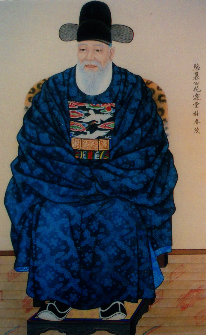 민양공 화천당 박춘무 선생